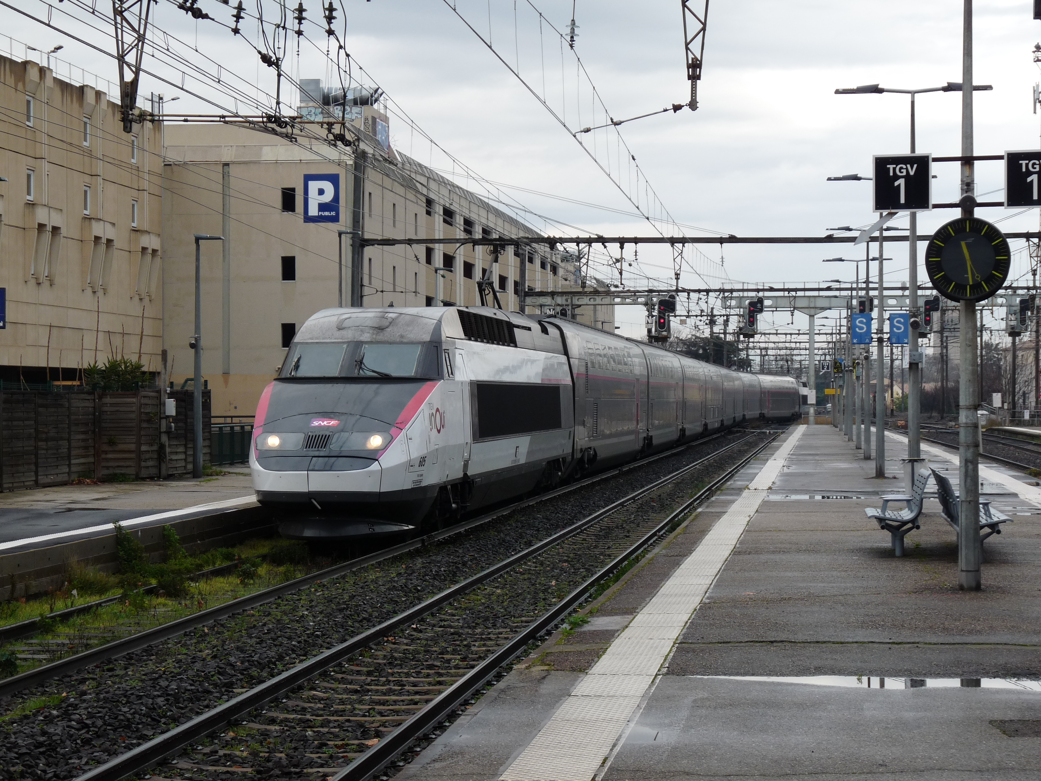 Het station Avignon Centre